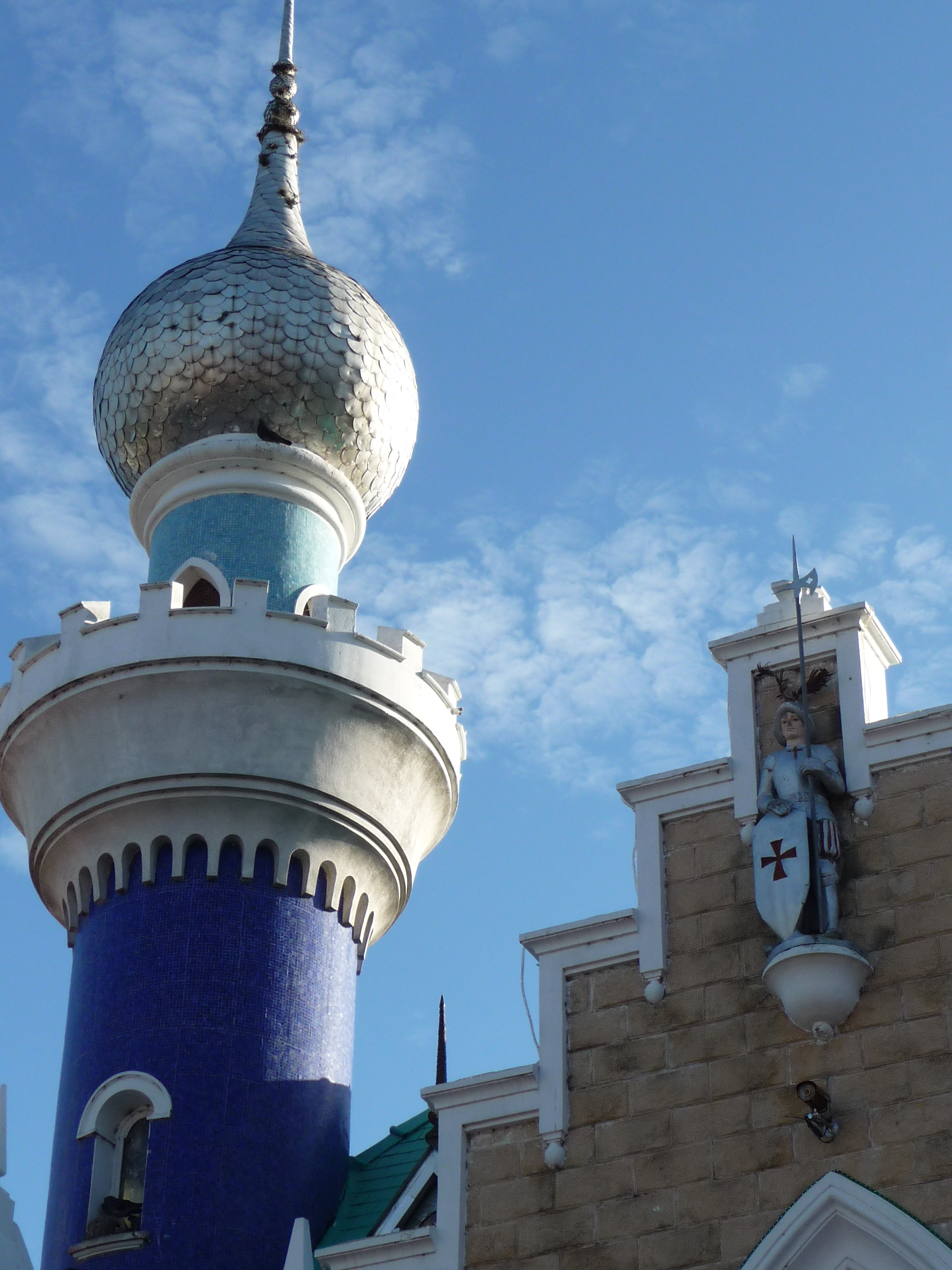 Torre y parte de la fachada principal de la Casa de Gobierno